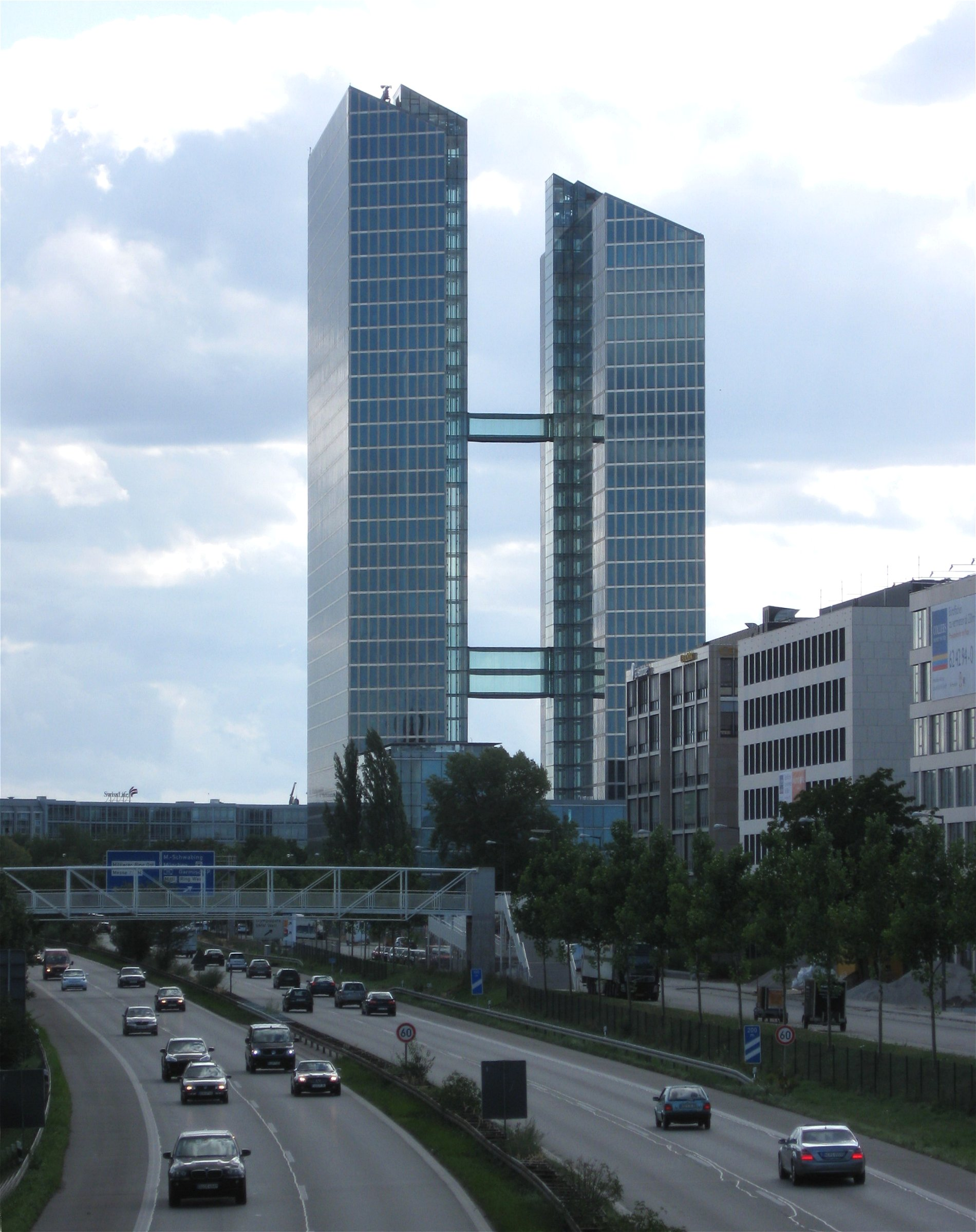 Highlight Towers an der A9, München